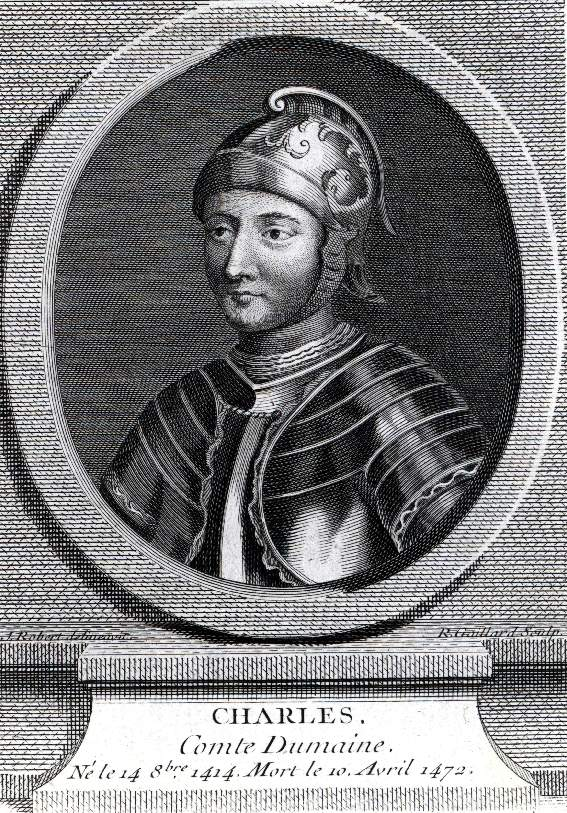 Karl IV. von Maine (1414-1472)